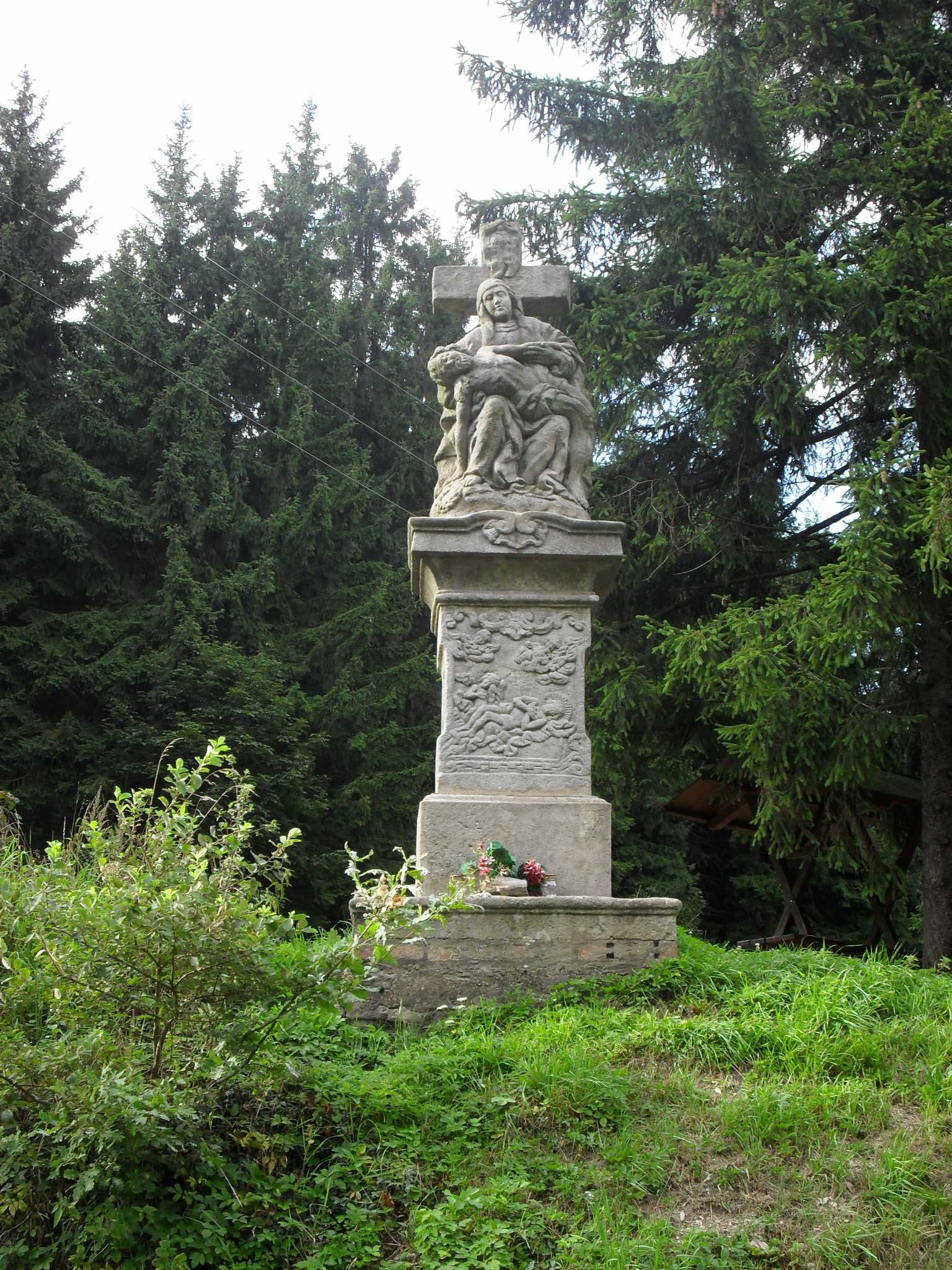 Socha Piety na Křižanském sedle